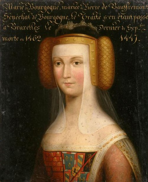 Marie de Bourgogne (morte en 1462), comtesse de Charny. Fille légitimée du duc Philippe le Bon, épouse de Pierre de Bauffremont, premier comte de Charny et sénéchal de Bourgogne